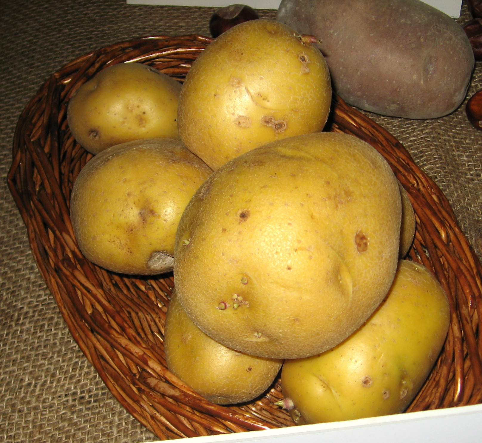 odrůda Anuschka